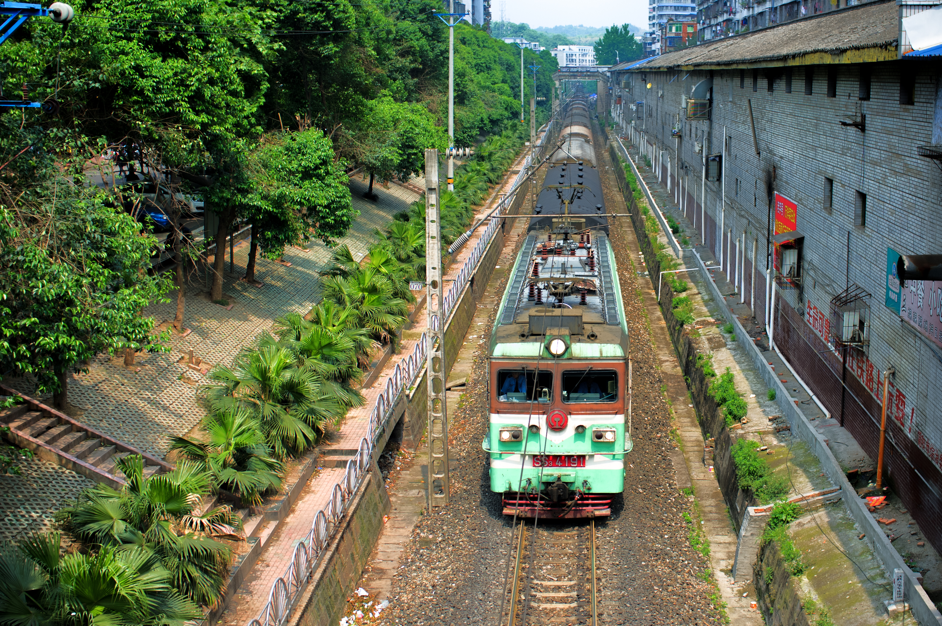 中文（中国大陆）: 成渝铁路经过简阳市